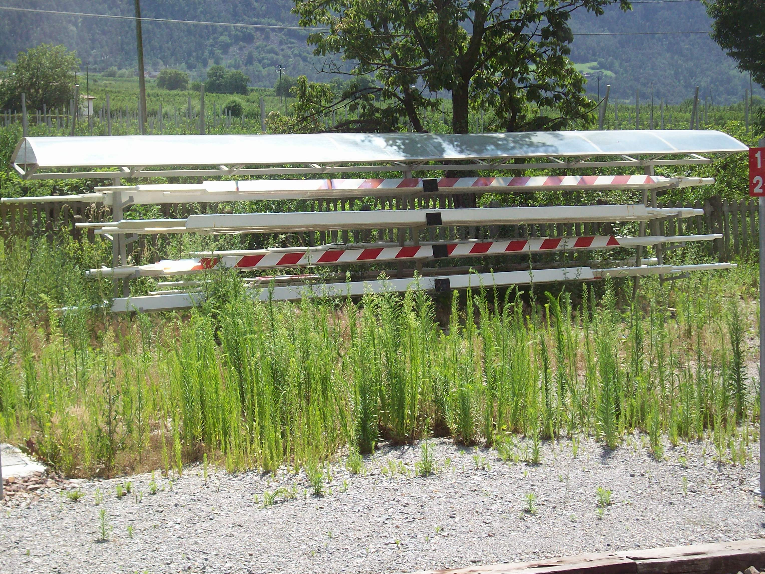 Sbarre per passaggio a livello riposte per scorta.